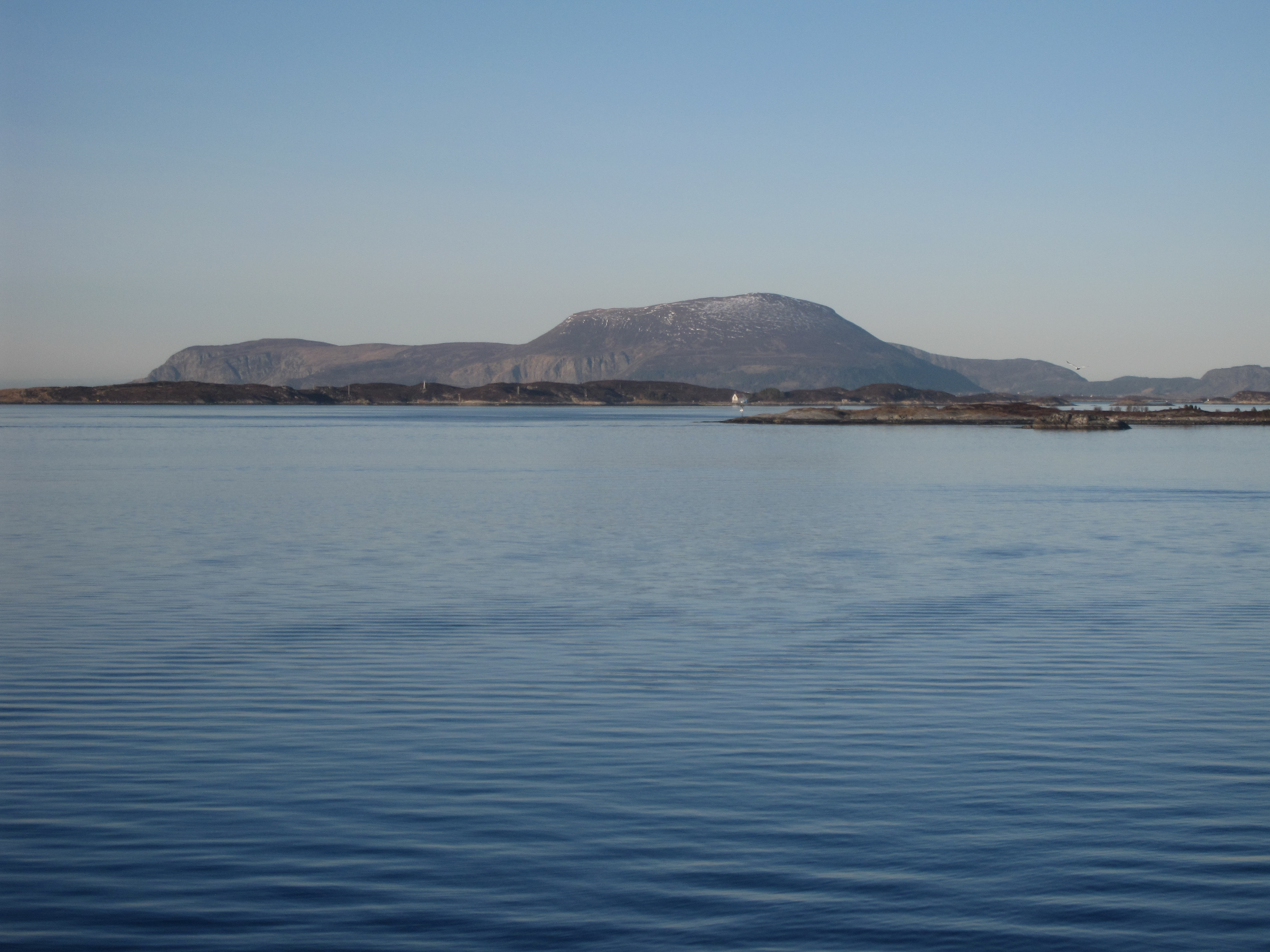 Lepsøya 2013